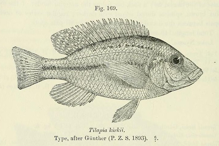 Protomelas kirkii